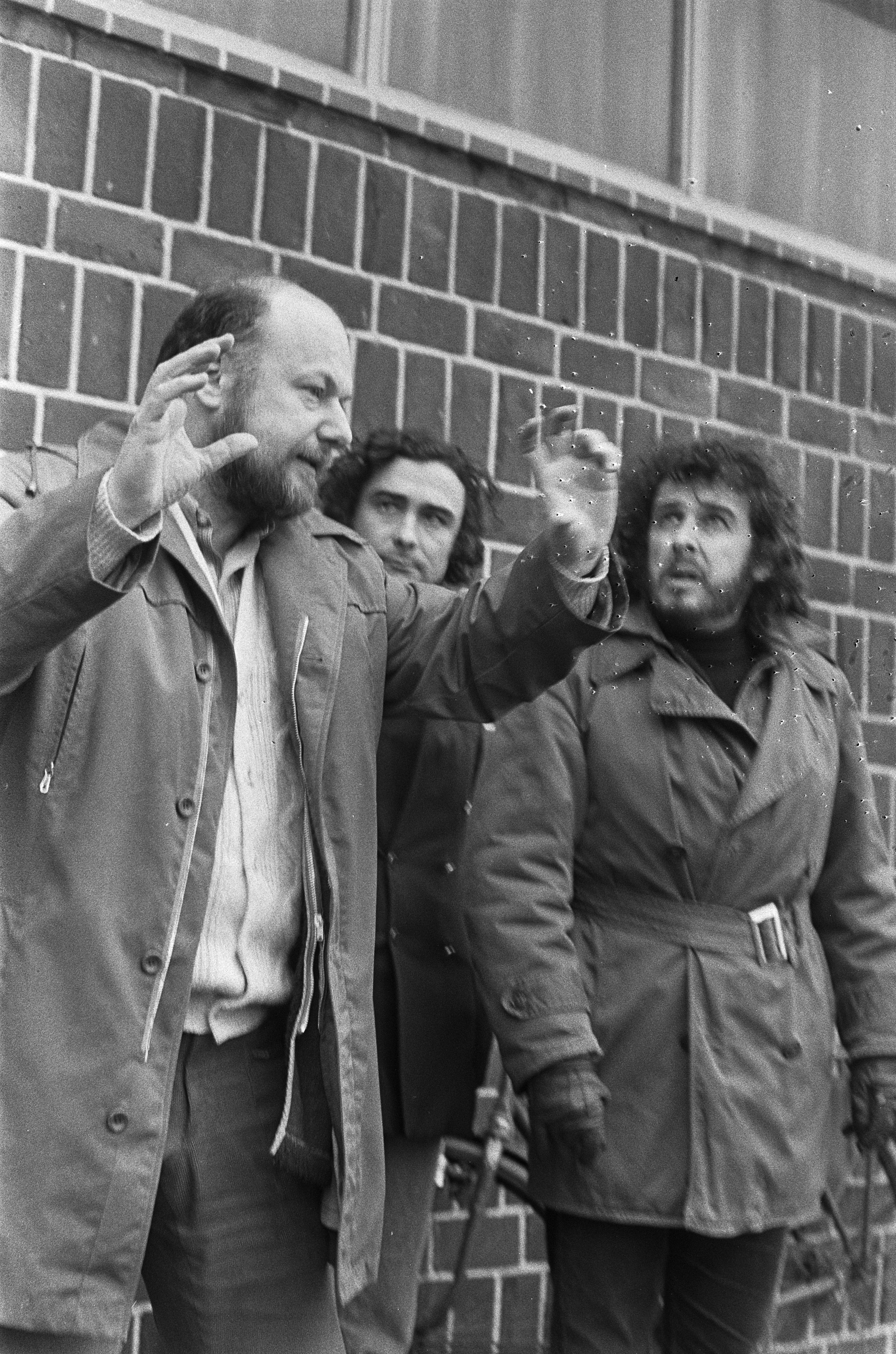 Collectie / Archief : Fotocollectie Anefo Reportage / Serie : Filmregisseur Dusan Makavejev in Amsterdam Beschrijving : De regisseur geeft uitleg Datum : 4 maart 1974 Locatie : Amsterdam, Noord-Holland Trefwoorden : filmopnames, filmregisseurs Persoonsnaam : Makavejev, Dusan Fotograaf : Fotograaf Onbekend / Anefo Auteursrechthebbende : Nationaal Archief Materiaalsoort : Negatief (zwart/wit) Nummer archiefinventaris : bekijk toegang 2.24.01.05 Bestanddeelnummer : 927-0414 Reacties Geplaatst door Maaike op 06 maart 2014 - 19:56. NB. Filmopnamen voor de speelfilm 'Sweet Movie'